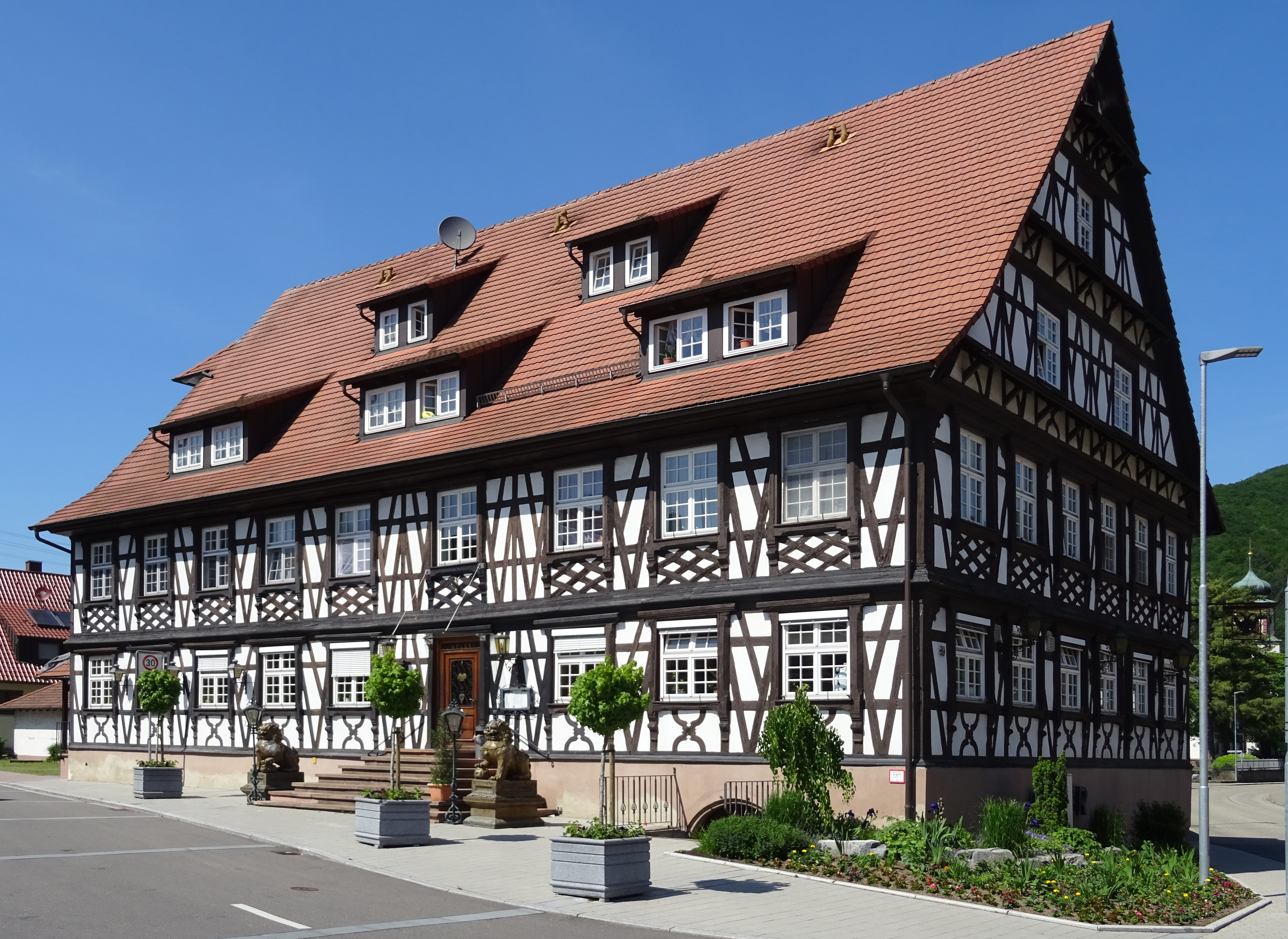 Gasthaus Schwarzer Adler in Steinach (Ortenaukreis), heute: China-Restaurant „Schloss“